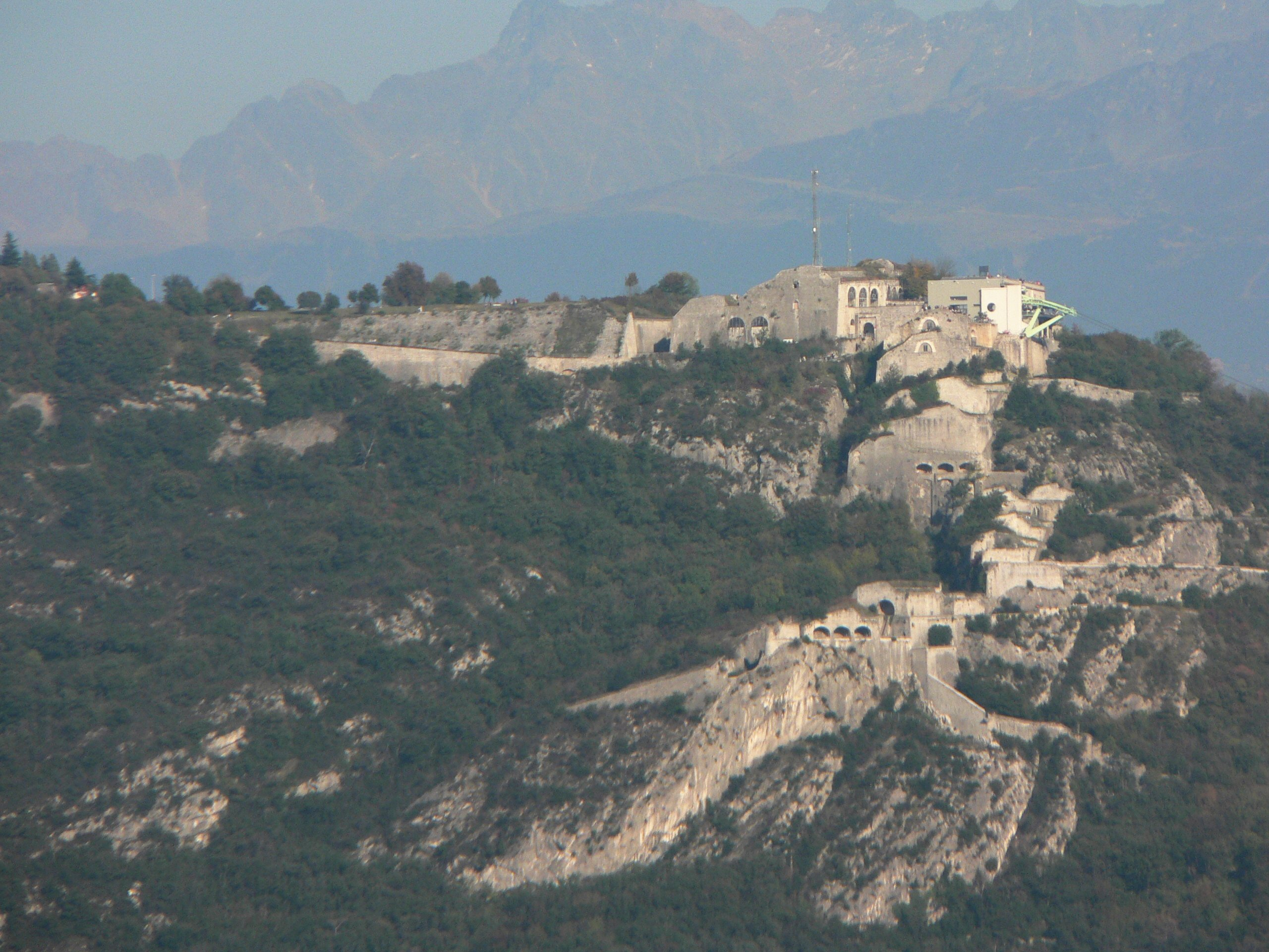 Fortifications de la Bastille à Grenoble, y compris le glacis, pris des falaises de Fontaine